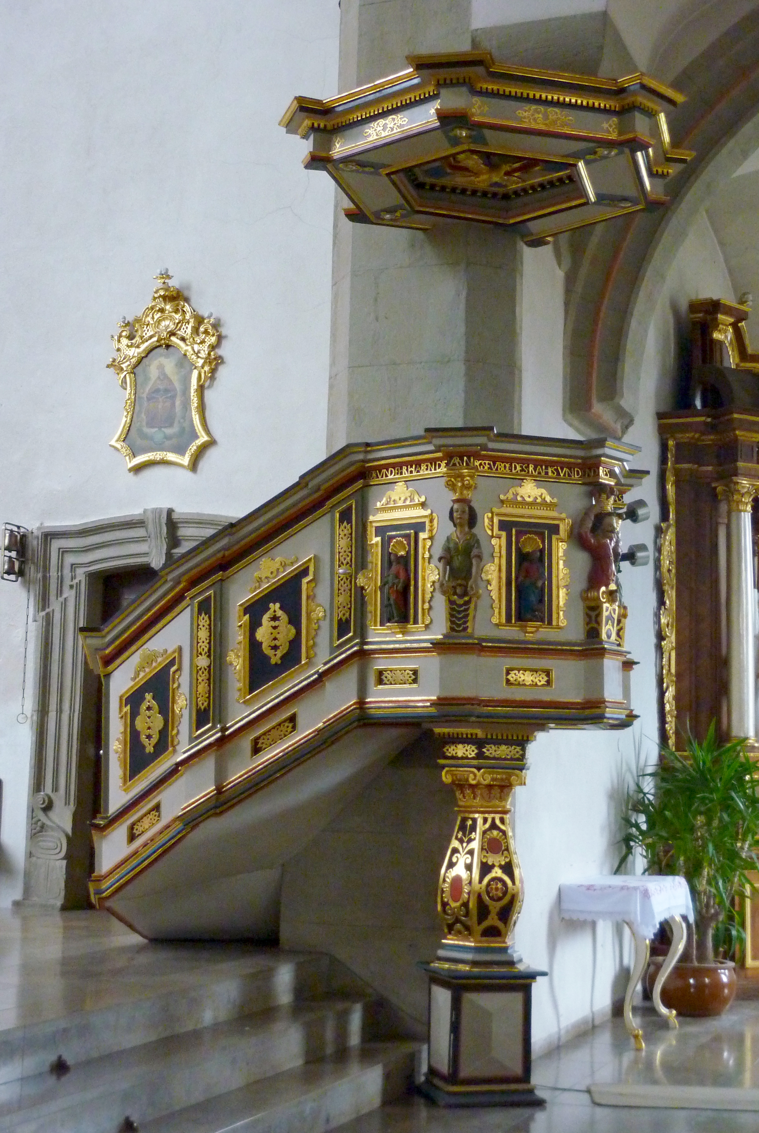 katholische Stadtpfarrkirche St. Peter und Paul in Grünsfeld im Main-Tauber-Kreis (Baden-Württemberg), Hauptstraße 18